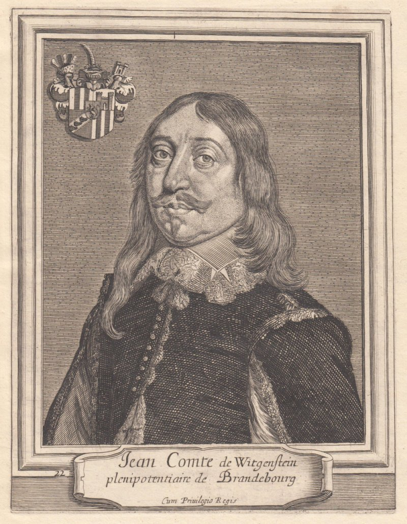 Johann VIII. zu Sayn-Wittgenstein-Wittgenstein - Kuppferstich um 1650